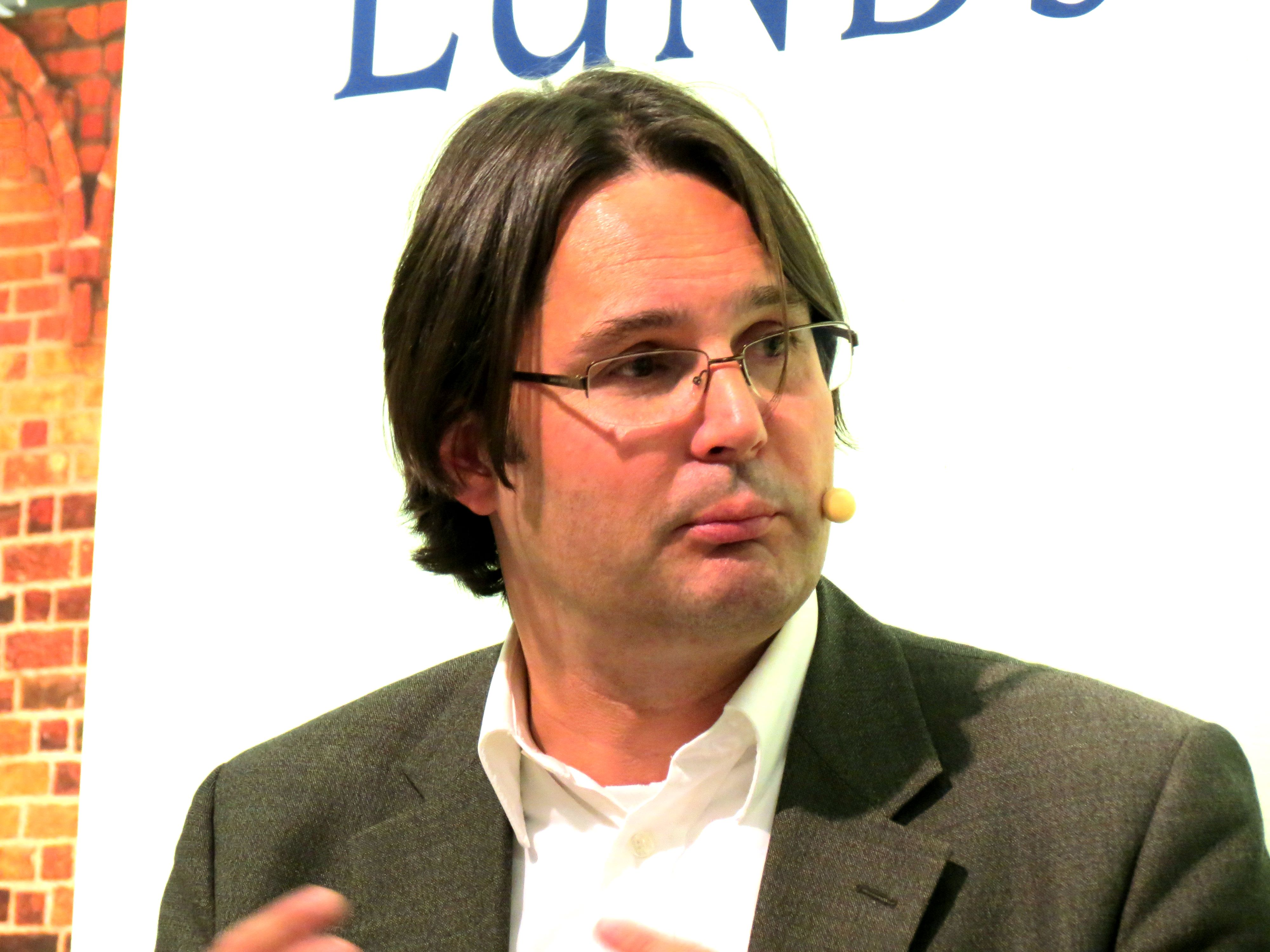 David Dunér, professor i idé- och lärdomshistoria vid Lunds universitet.